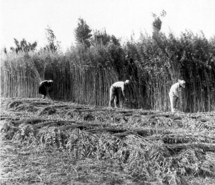 Negatief. Het oogsten van hennep (Cannabis sativa L.)